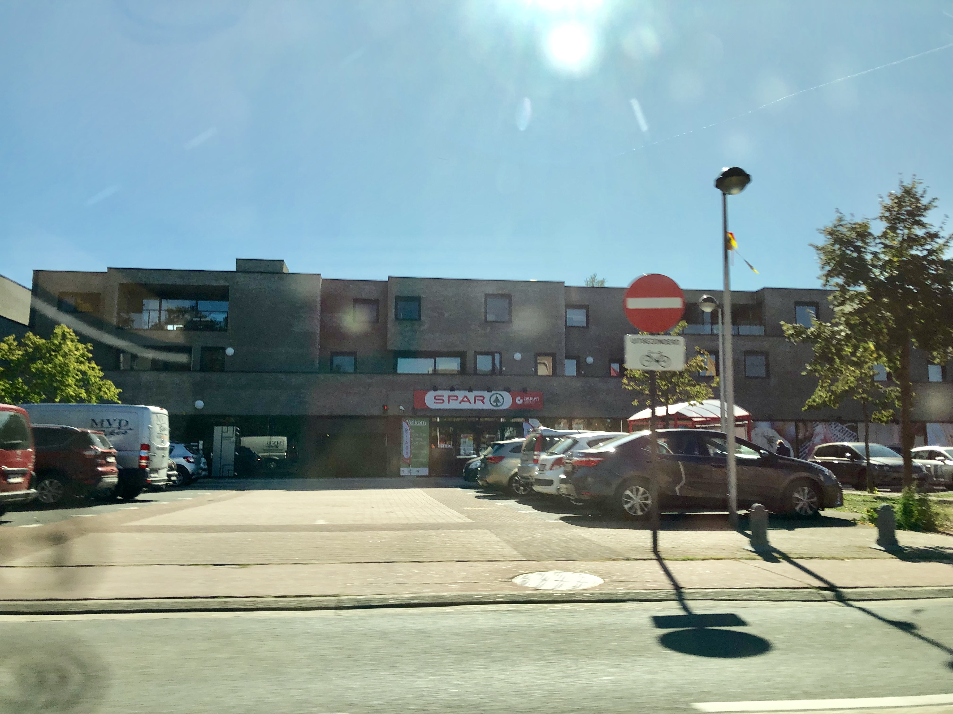 Lommel, België, September 2019